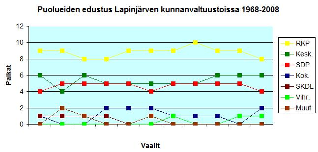 Kuvaaja Lapinjärven kunnan puoluejakaumista kunnanvaltuustoissa